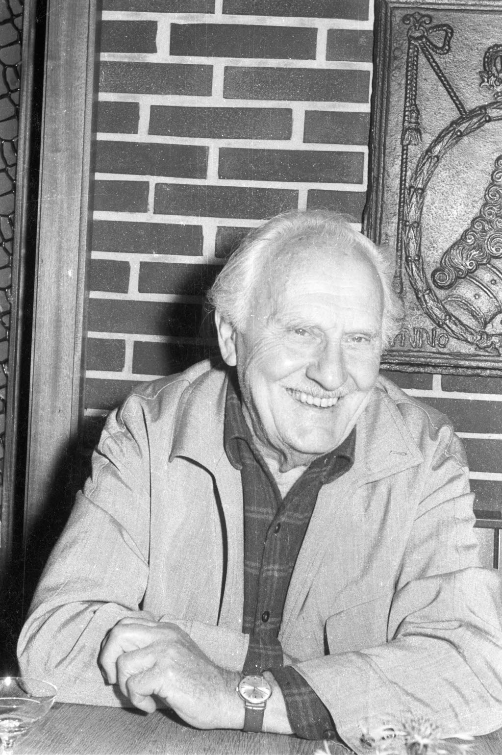 Aufnahme im Elternhaus, Landkrug Stampe, wo er seinen Lebensabend verbringt.